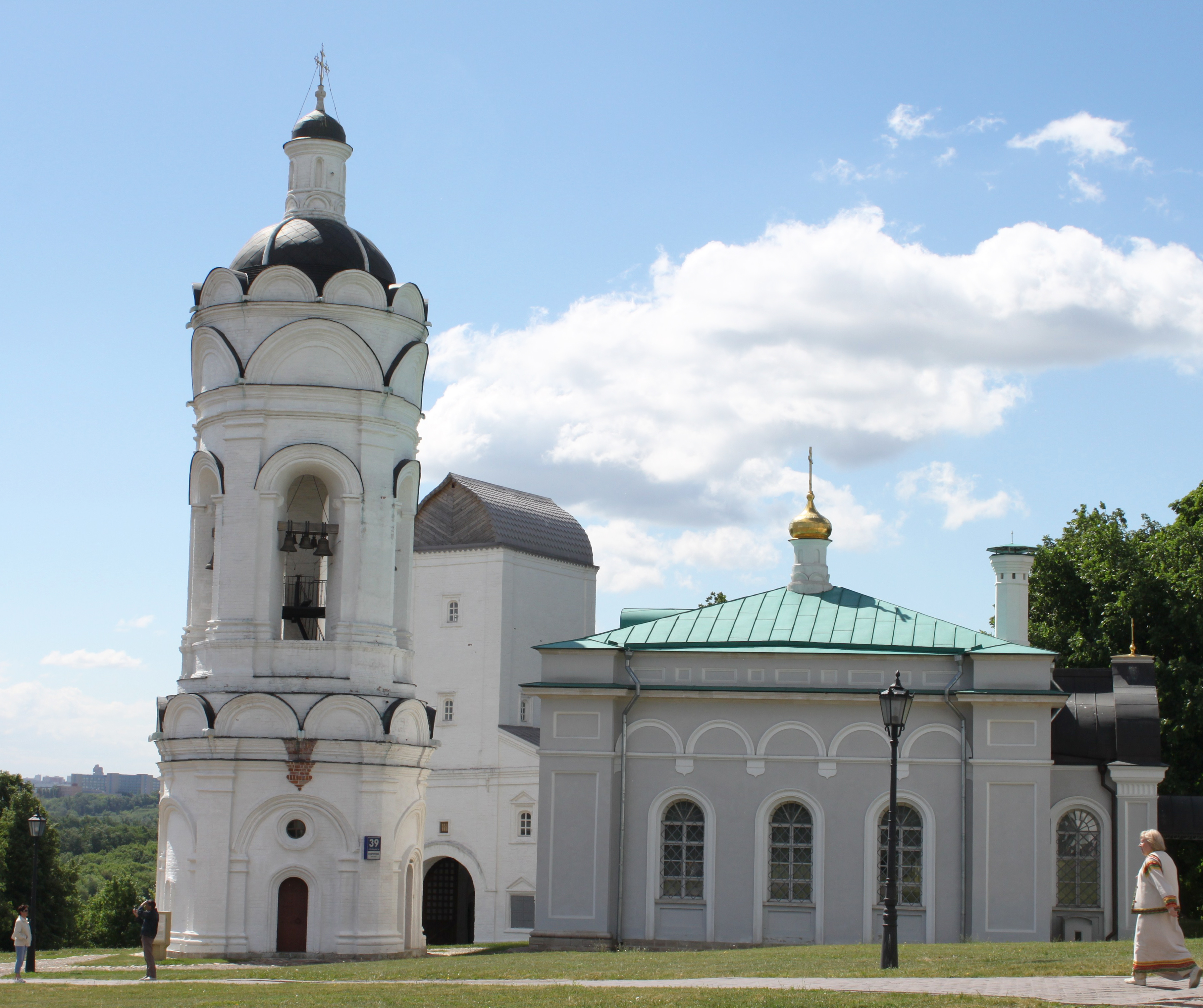 Усадьба «Коломенское» (Москва и Московская область, Москва, Андропова проспект, 31, 39)